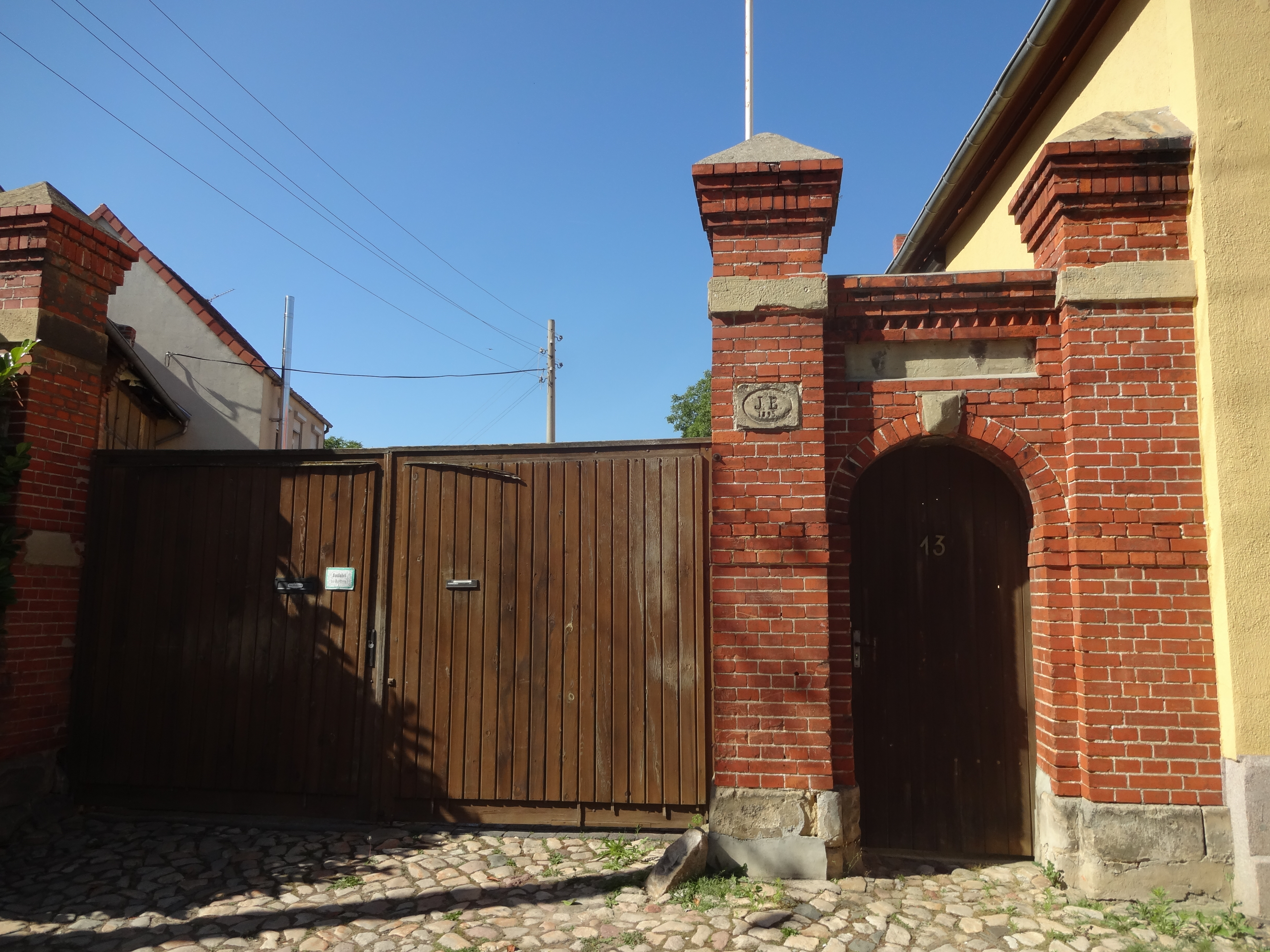 Toreinfahrt zum Bauerngehöft Kirchstraße 13 in Harsleben, das dazugehörige Wohnhaus ist denkmalgeschützt